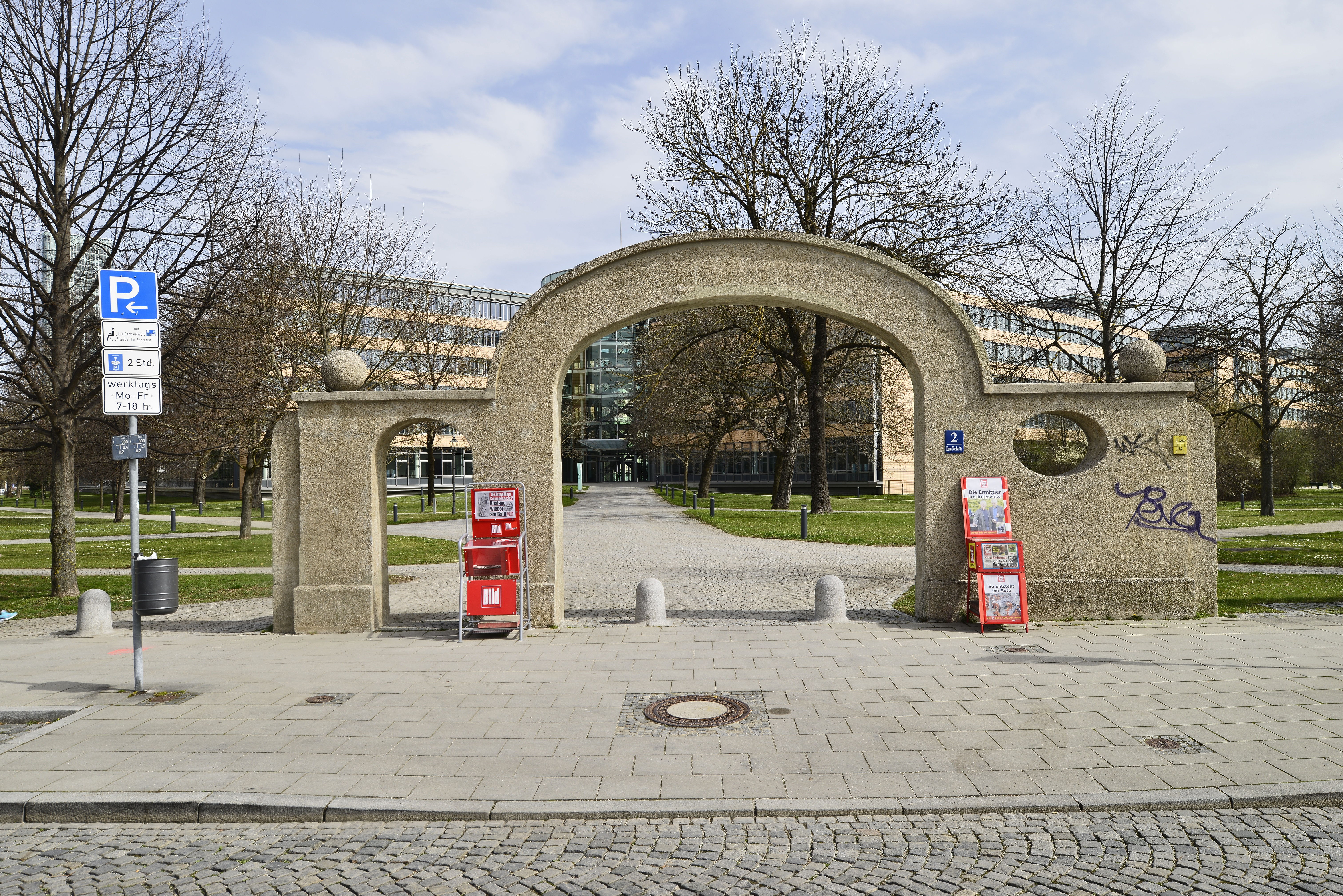 München, Moosach. Ehemalige Portal und Einfriedungsreste zum Gaswerk München an der Dachauerstraße gelegen mit der Anschrift Emmy-Nöther-Straße 2.